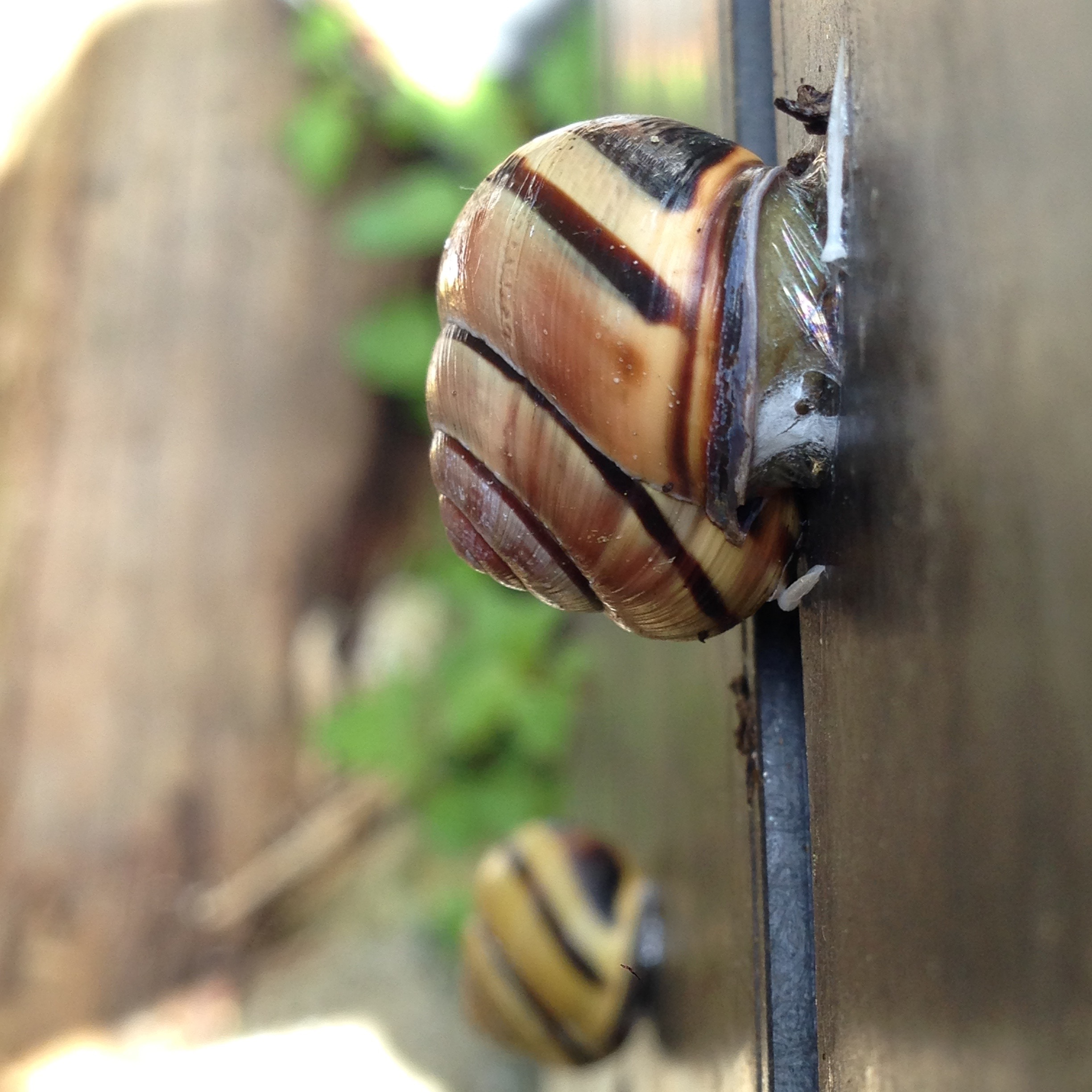 Schnecken nach der Fortpflanzung mit zwei Liebespfeilen (73614 Schorndorf, Deutschland)